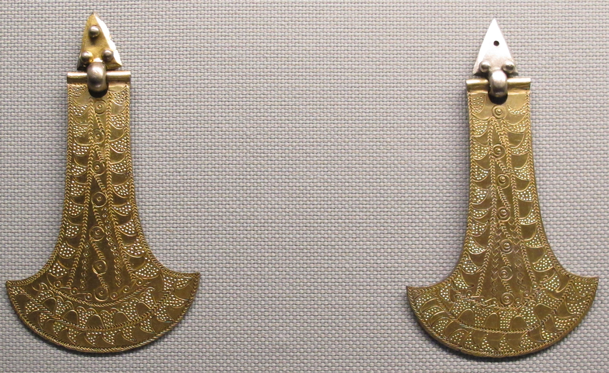 Primo tesoro di cosoveni de jos, pezzi di bardatura, V sec